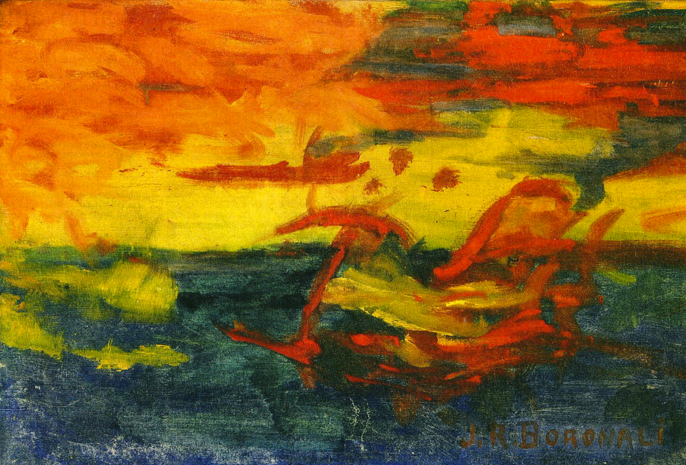 Sonnenuntergang über der Adria (Coucher de Soleil sur l'Adriatique) Öl auf Leinwand, gezeigt 1910 im Salon des Indépendants in Paris